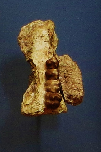 Fossil of Phosphatherium, an extinct mammal- Took the photo at Musee d'Histoire Naturelle, Paris